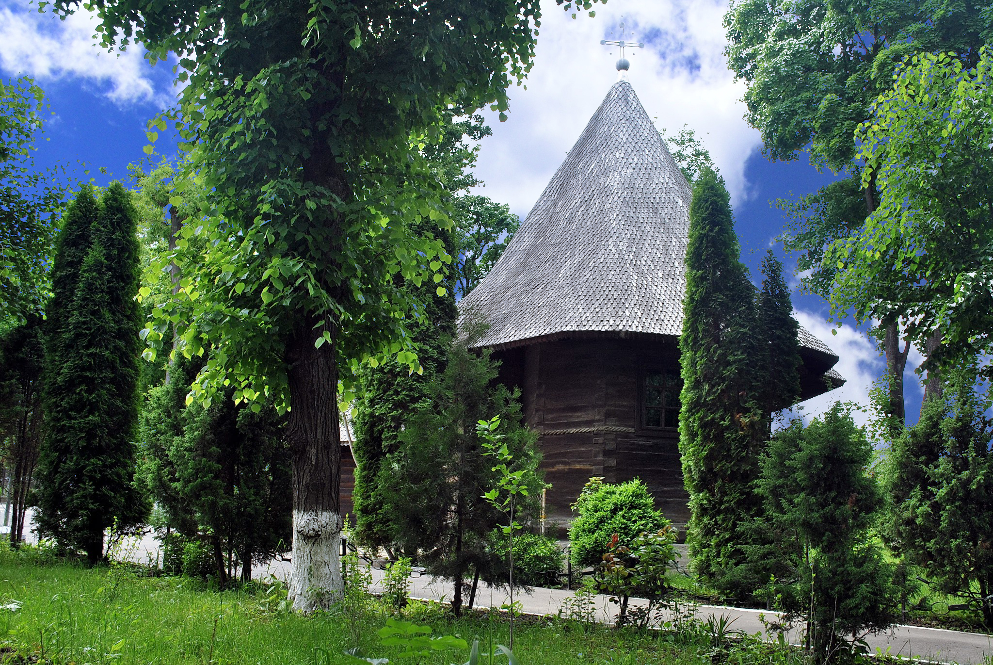 Bisericuța este construita din bârne de stejar pe temelie de piatra, ridicata pana la înălțimea de un metru, are legătura bârnelor "încheiate" pana la bolțile de sus din pronaos, naos și altar formând un tot unitar, arătând construcția veche, solida, a veacurilor trecute, motiv pentru care a fost trecuta în rândul monumentelor vechi naționale.